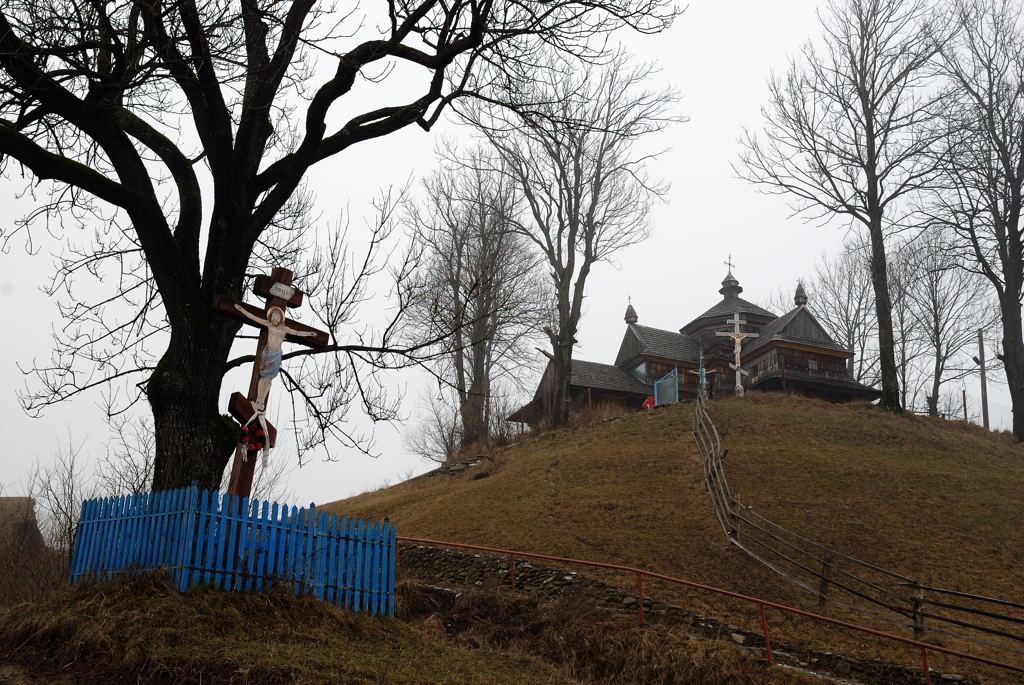 Вознесенська (Струків-ська) церква (дер.), смт.Ясіня